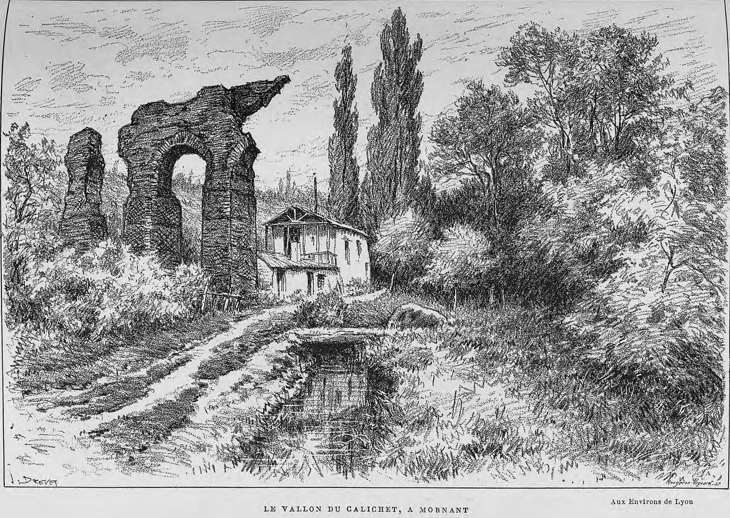 Aux environs de Lyon / Monsieur Josse ; préface de M. Coste-Labaume ; édition illustrée de 250 dessins de J. Drevet.